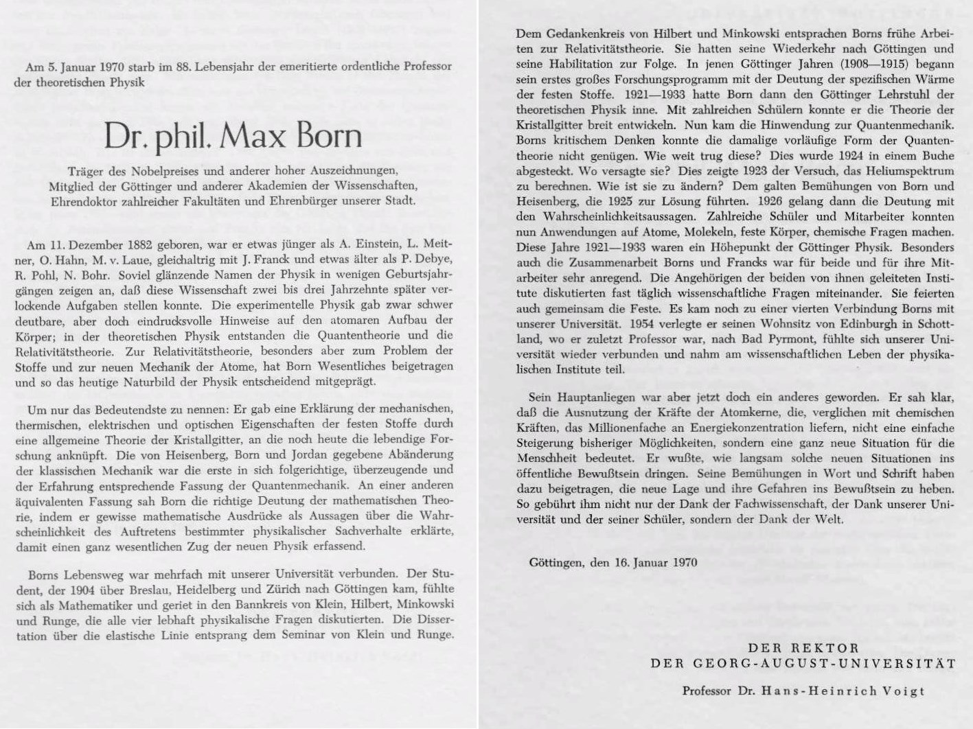 Nachruf auf Max Born, veröffentlicht am 16. Januar 1970 von Hans-Heinrich Voigt, Rektor der Georg-August-Universität Göttingen.